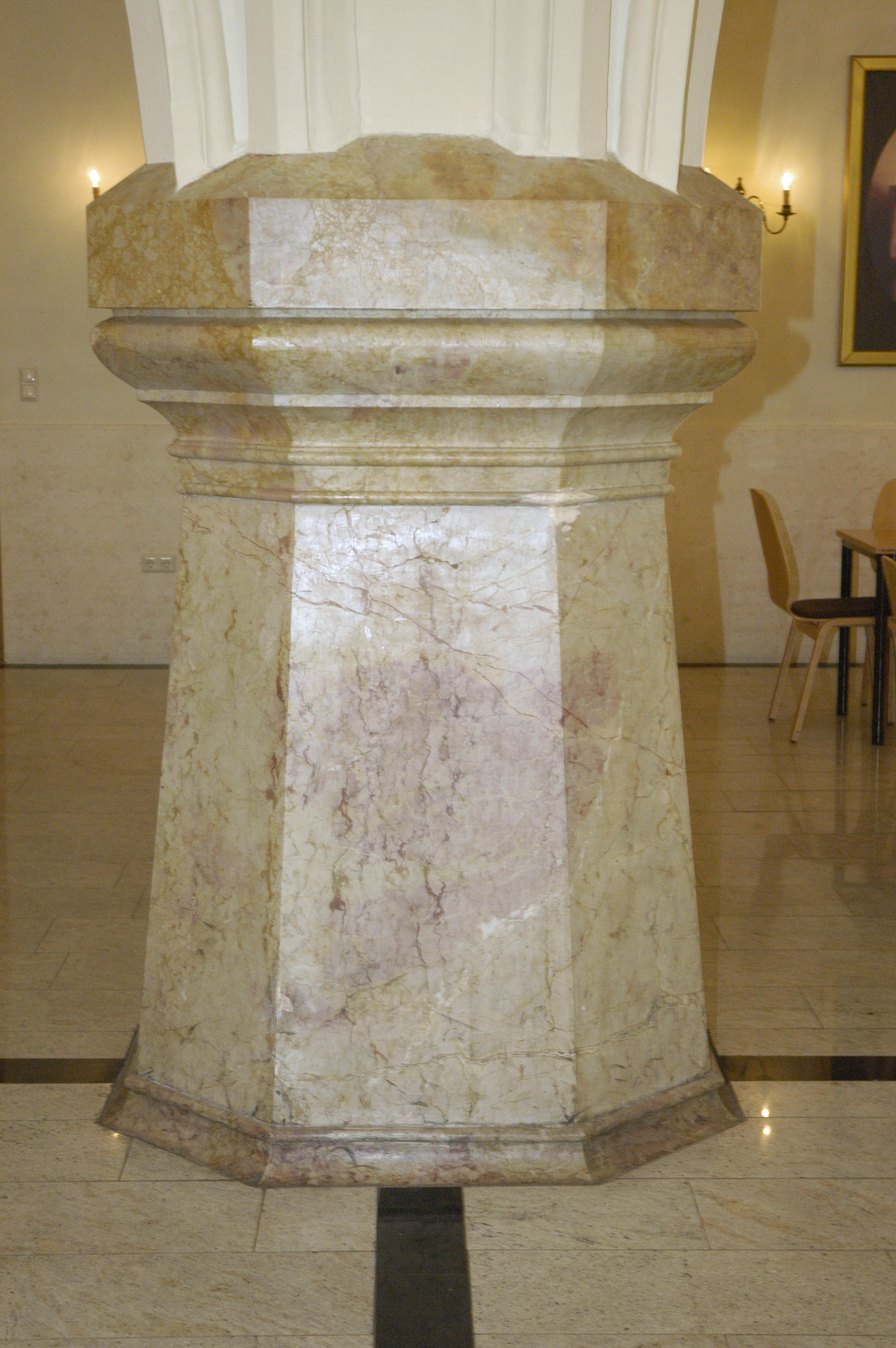 Martin-Kaserne, Marmorpfeiler mit Kapitell in der Cafeteria (Detail)